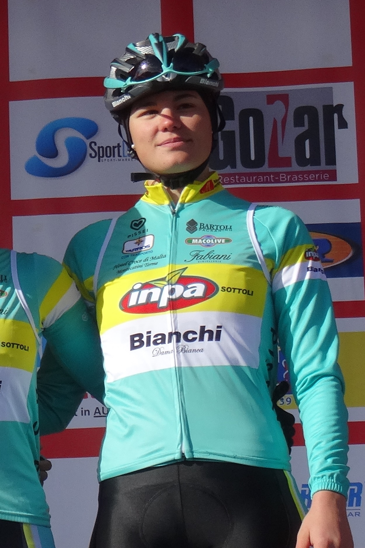 Reportage réalisé le mercredi 4 mars à l'occasion du départ du Samyn des Dames 2015 et du Samyn 2015 à Quaregnon, Belgique.